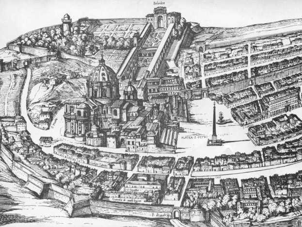 Campo Santo Teutonico und Dom St. Peter auf der Karte Antonio Tempestas, 1593